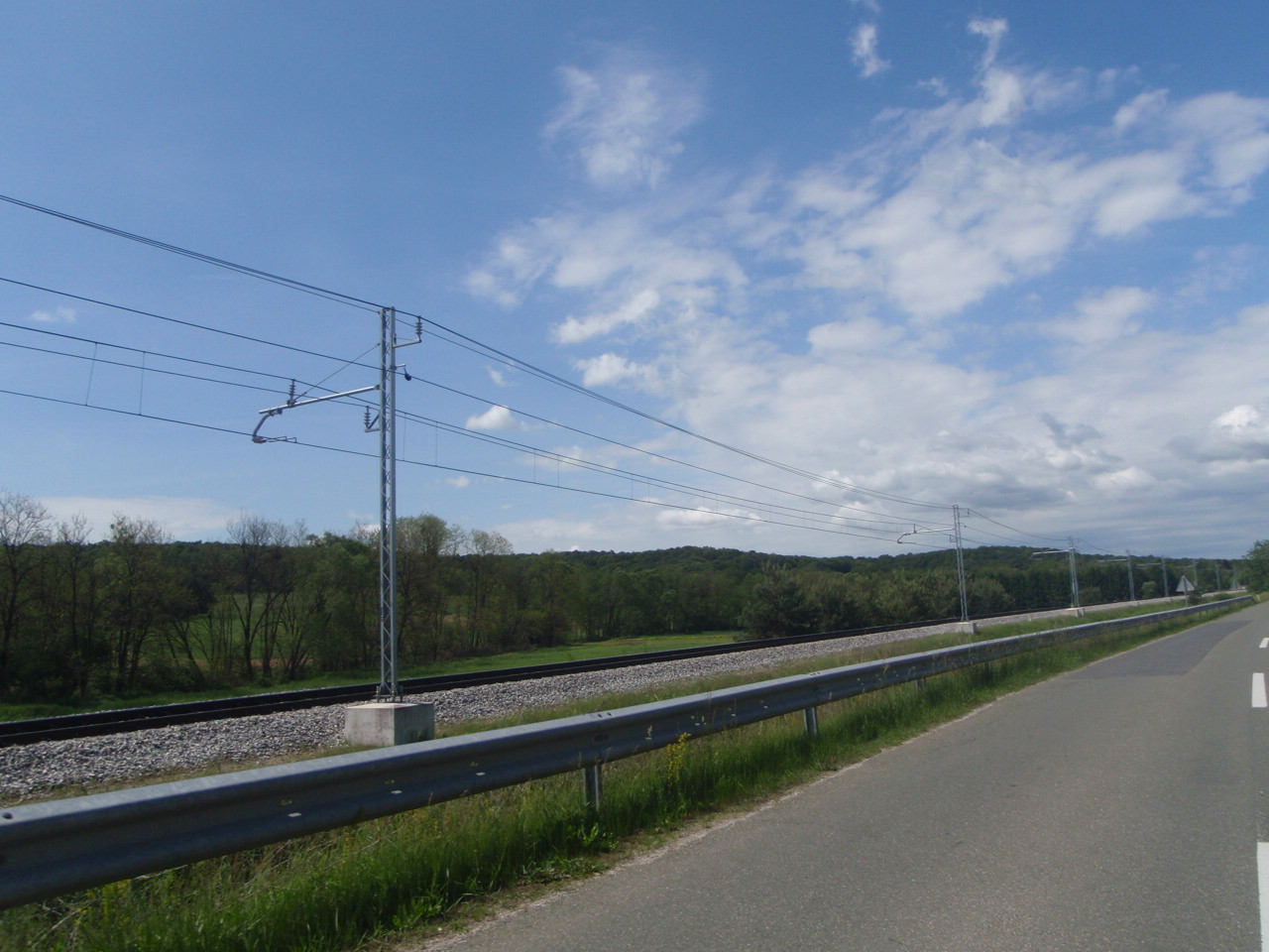 Szlovén vasút Mátyásdomb (Mačkovci) mellett